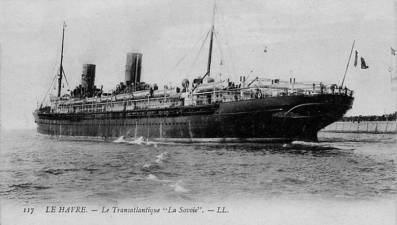 "La Savoie" paquebot postal transatlantique sortant du port du Havre.